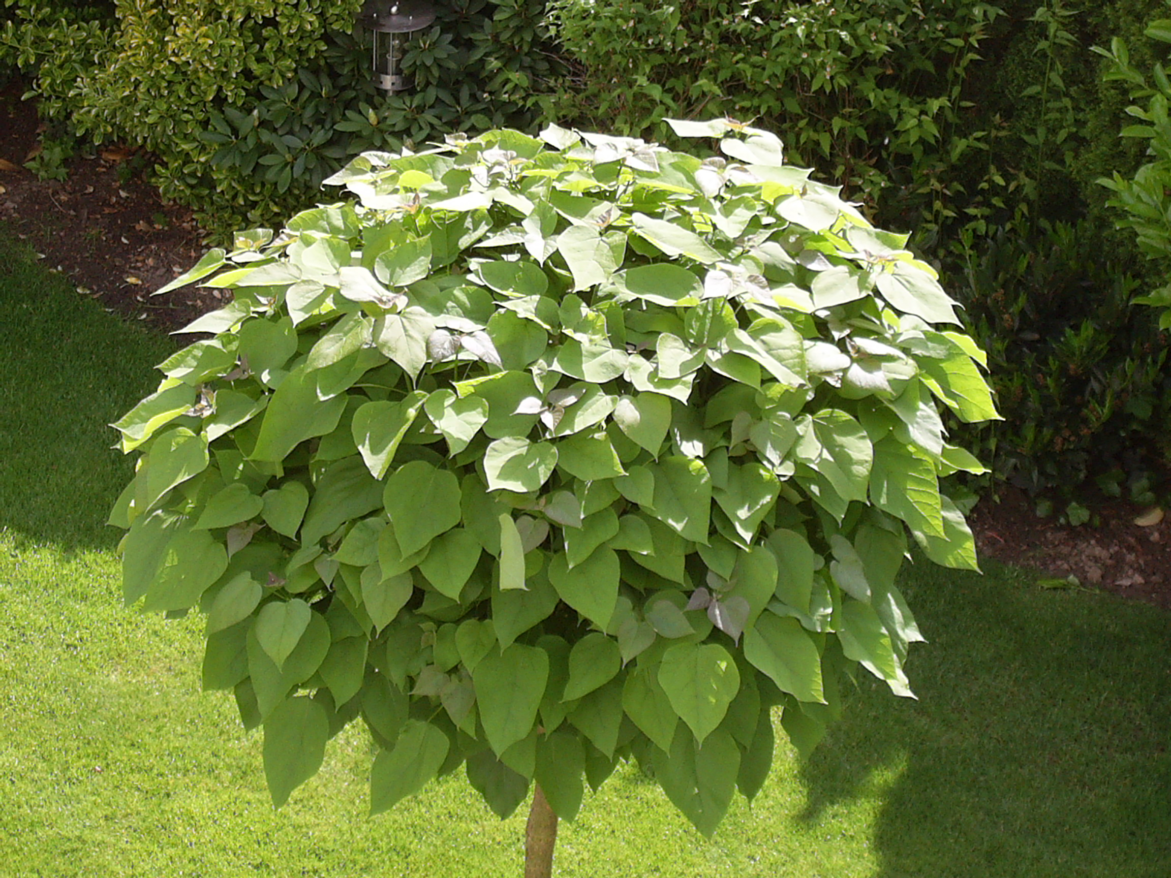 Luftansicht eines Trompetenbaumes